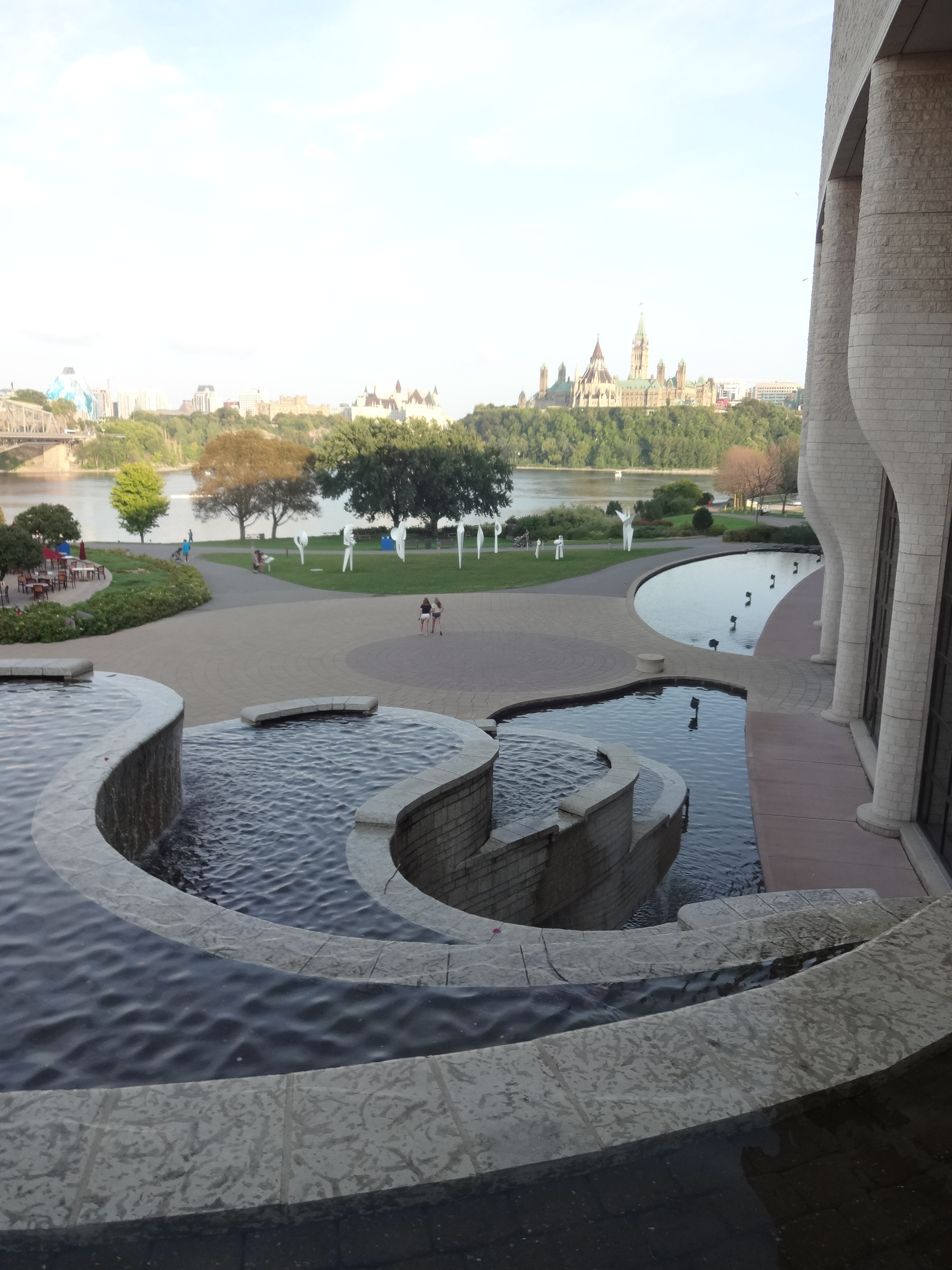 Parte externa do Canadian Museum of Civilization.